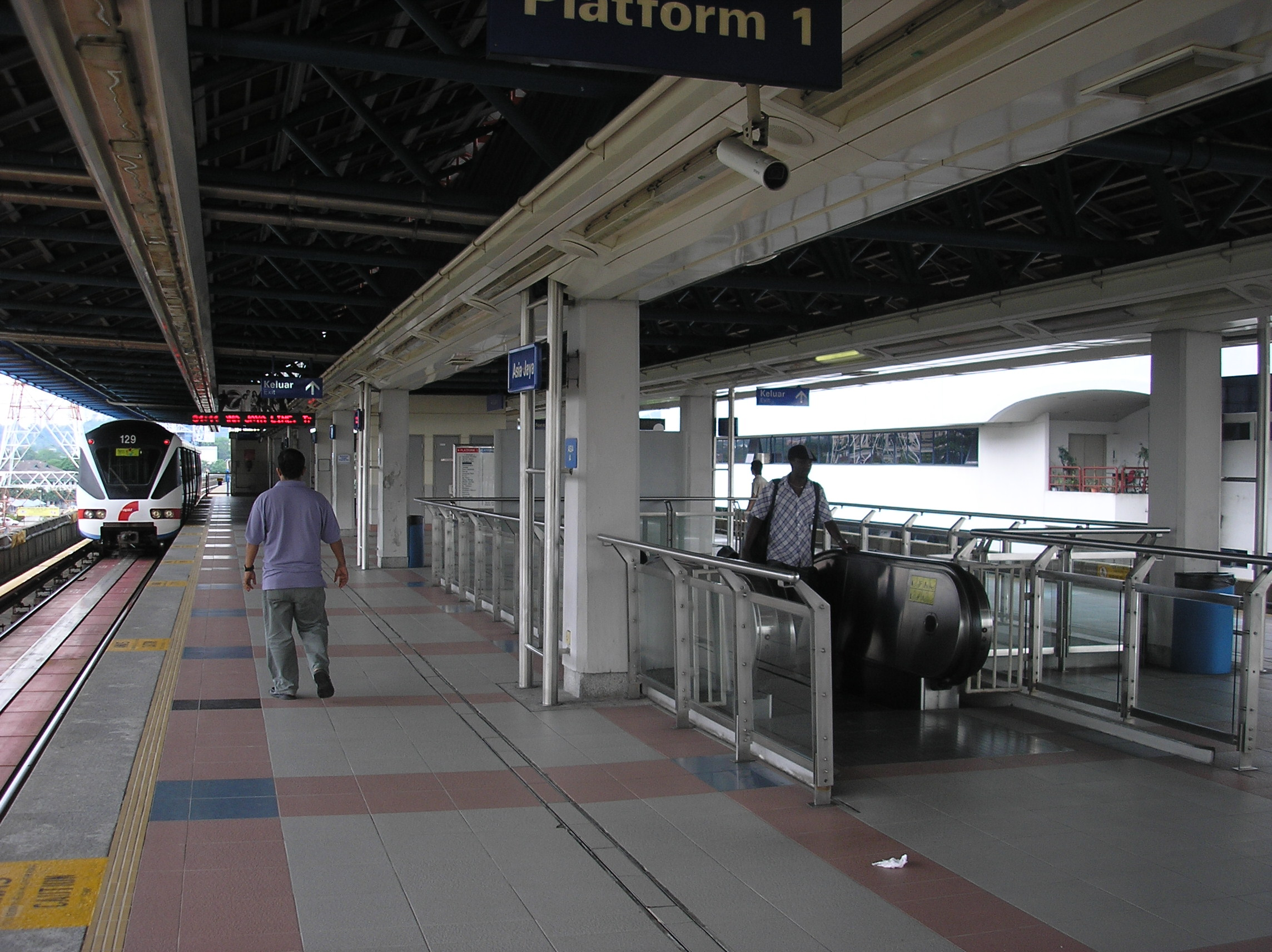 The Asia Jaya LRT station (Kelana Jaya Line) (day), Petaling Jaya, Selangor, Malaysia.